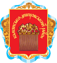 Герб Кам'янсько-Дніпровського району